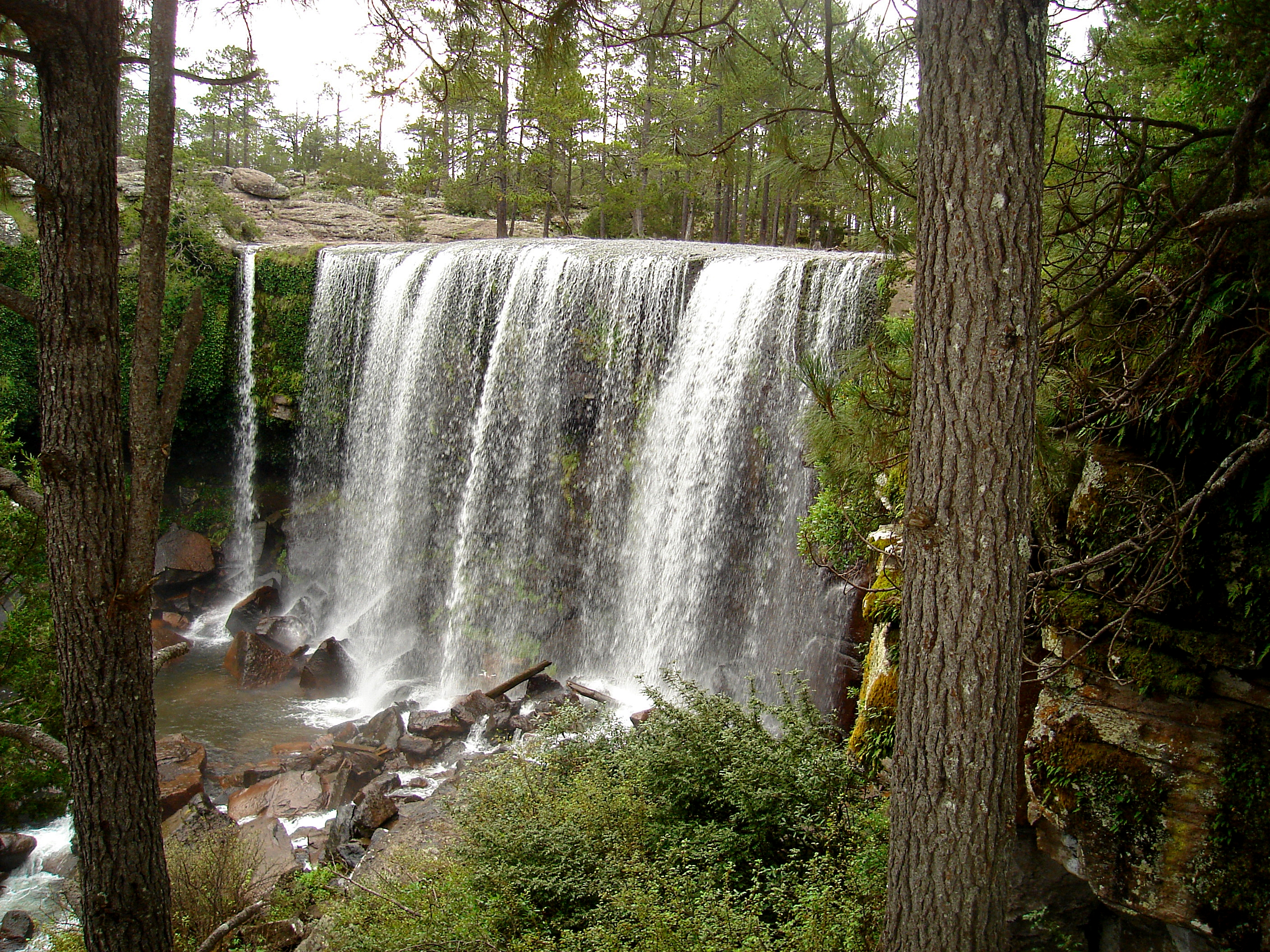 Cascada en el parque natural Mexiquillo, estado de Durango, México